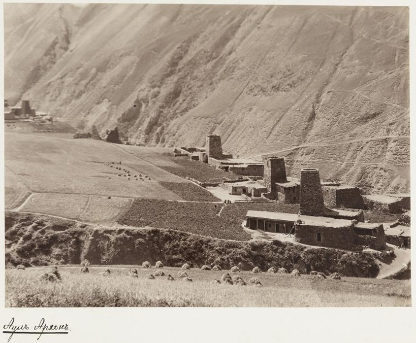 жилые и оборонительные постройки в селении Архон